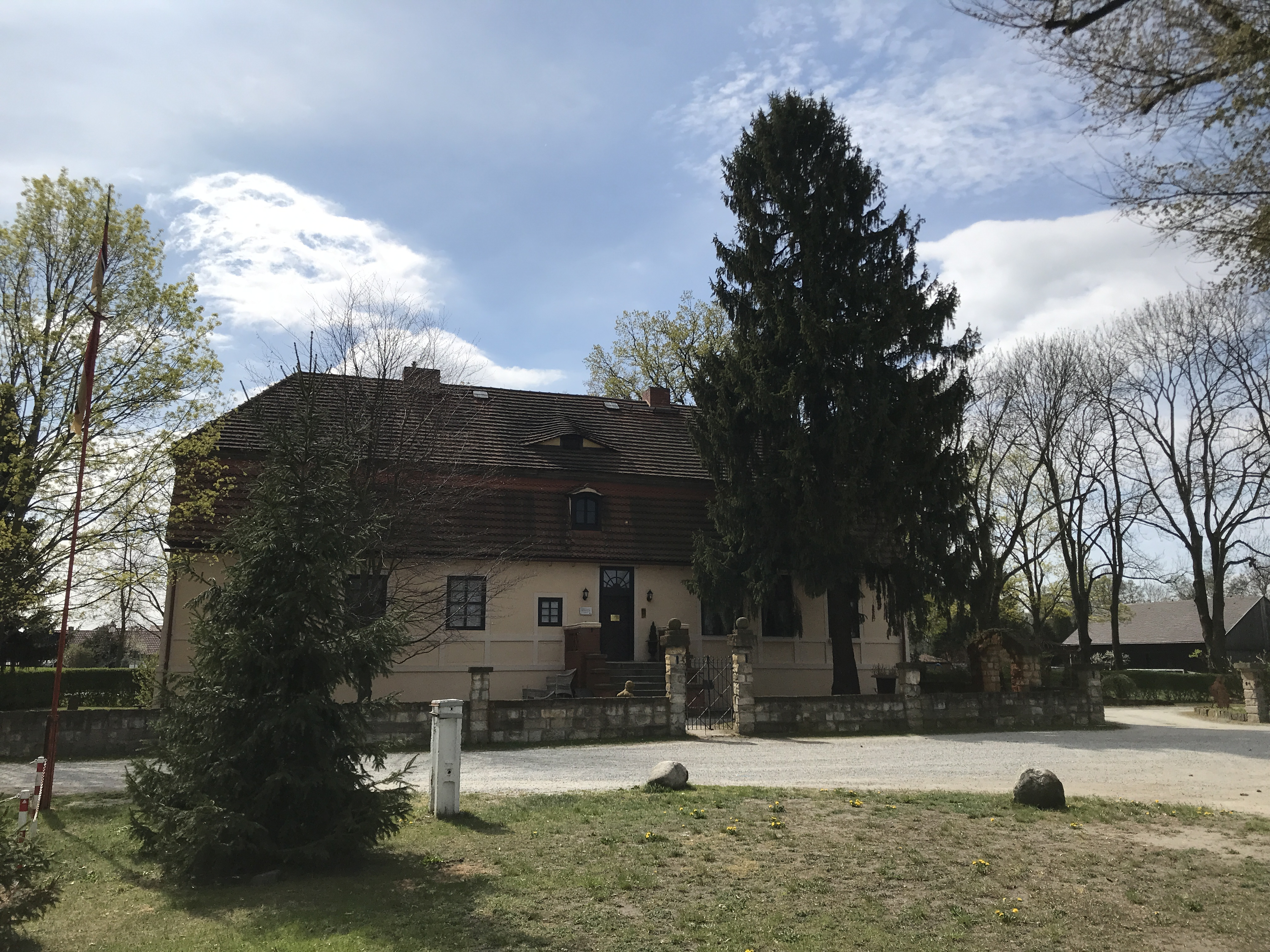 Milkersdorf, ein Ortsteil der Gemeinde Kolkwitz im brandenburgischen Landkreis Spree-Neiße